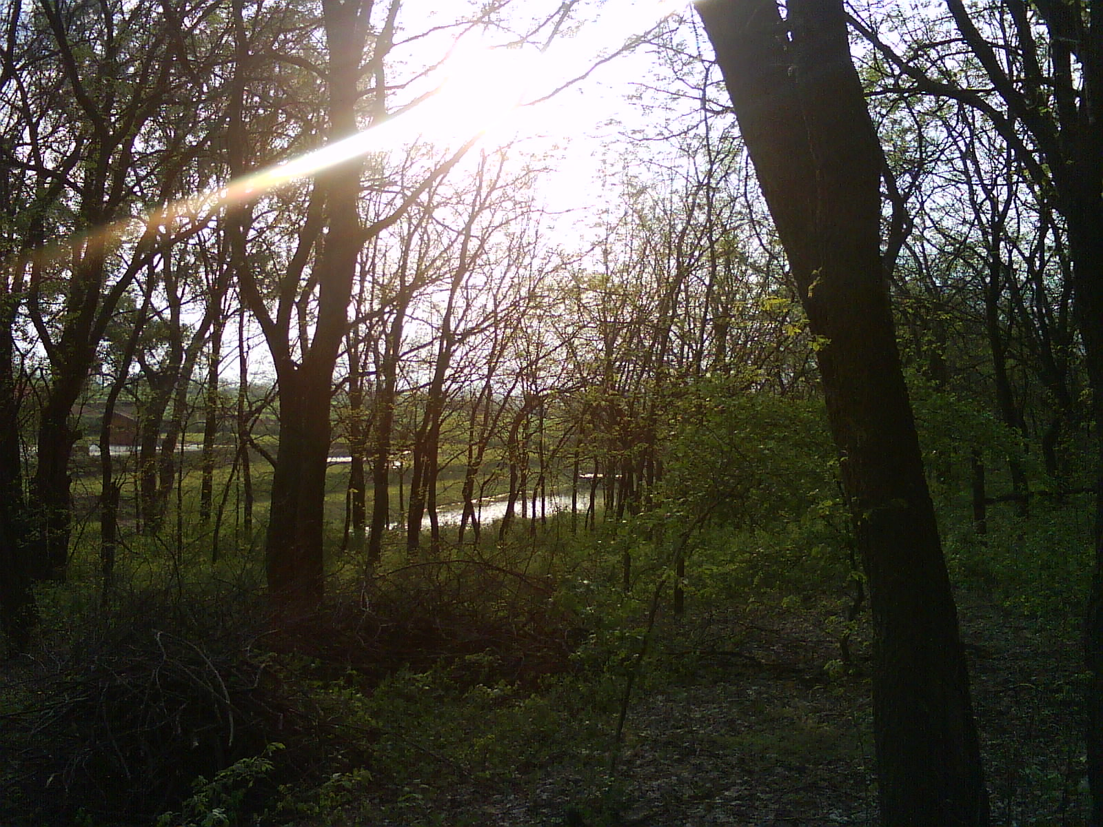 Erdő Csomádon